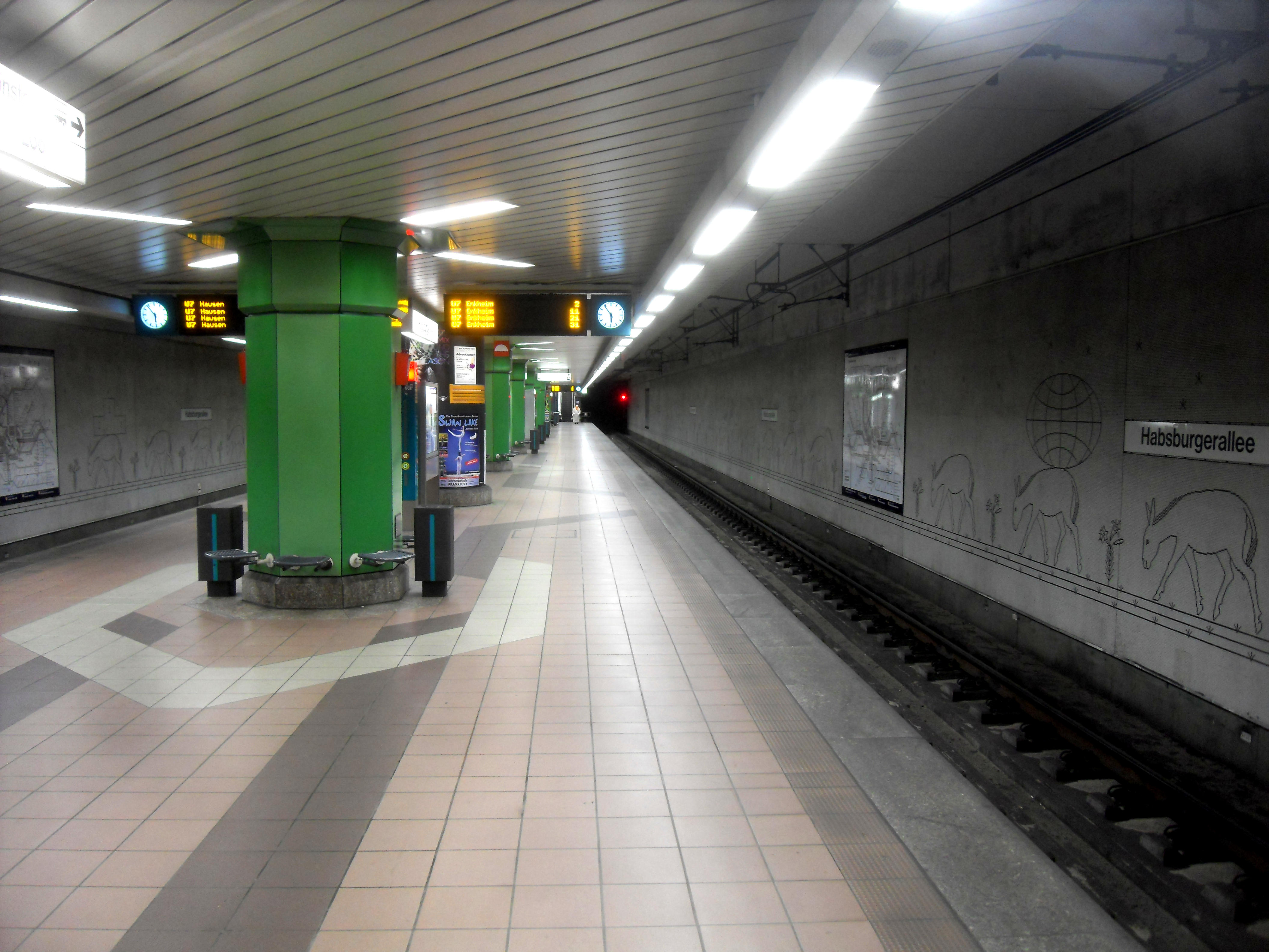 Bahnsteig des U-Bahnhofs Habsburgerallee (Richtung Frankfurt-Bergen-Enkheim) der U-Bahn Frankfurt auf der Linie U 7 in Hessen (Deutschland)